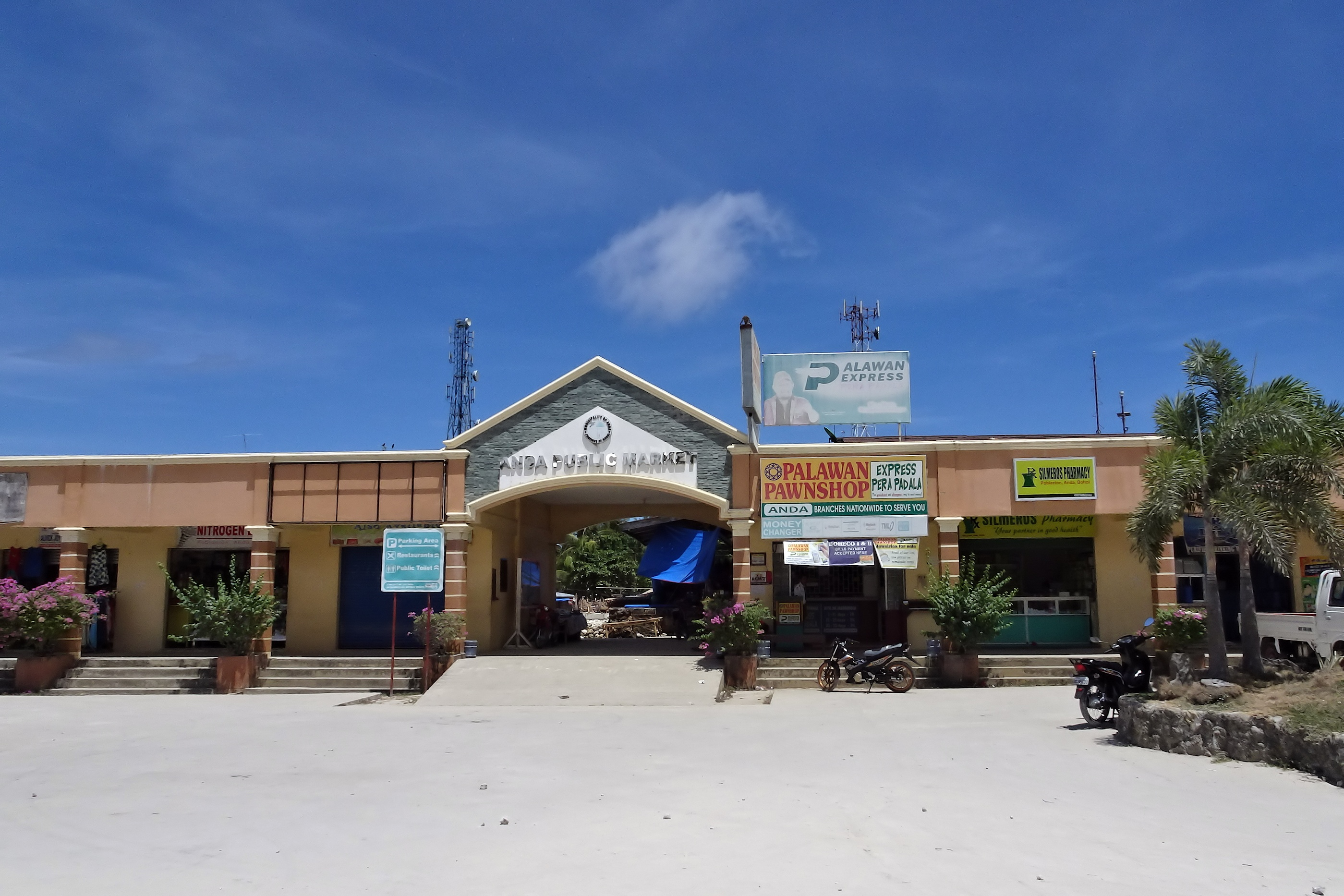 Anda, Bohol, Philippines